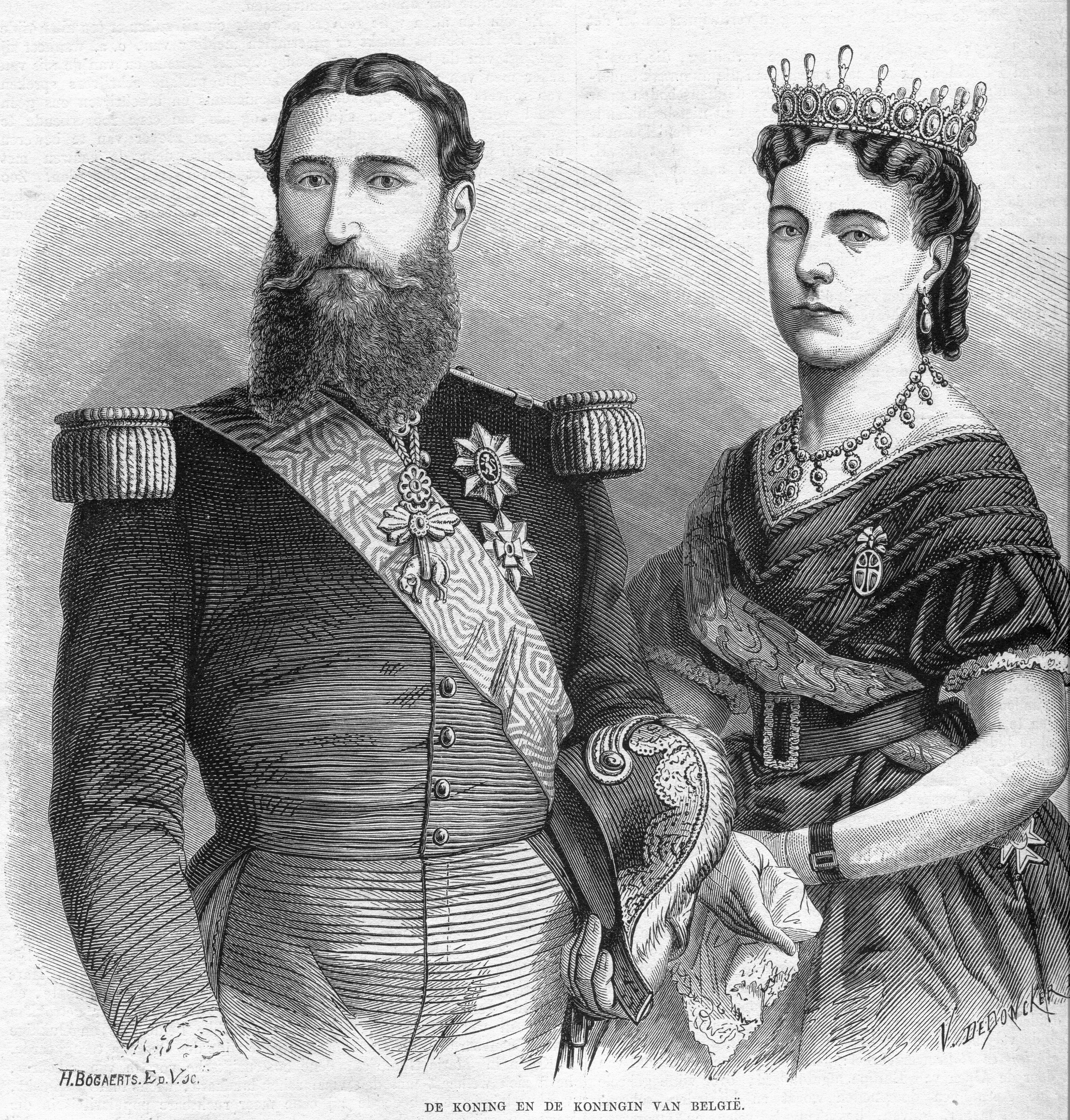 Kath. Illustratie 1869-1870 nr 46 p.364 De koning en de koningin van België